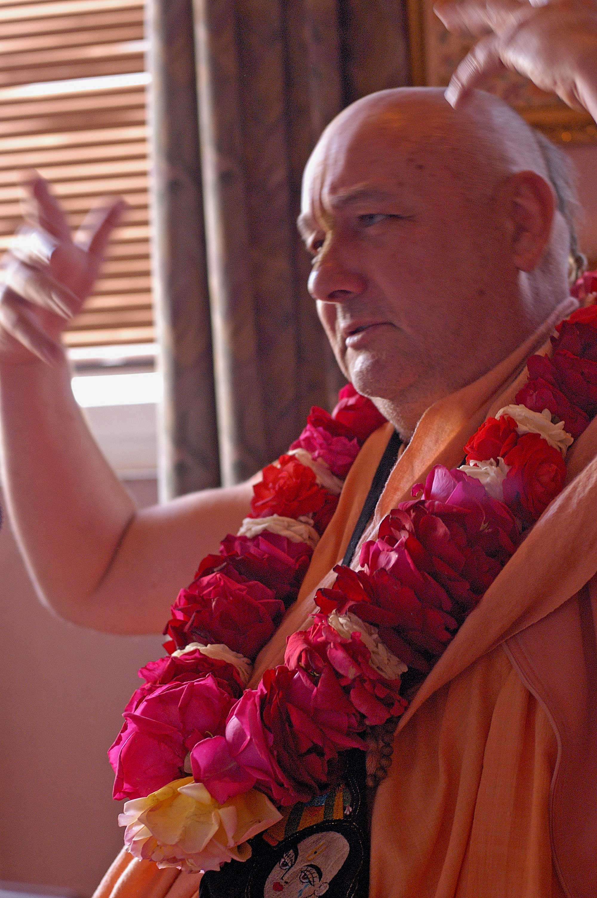 Сухотра Свами даёт лекцию в Праге, 2004 год